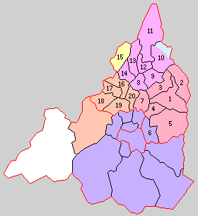 山形県東置賜郡の町村。